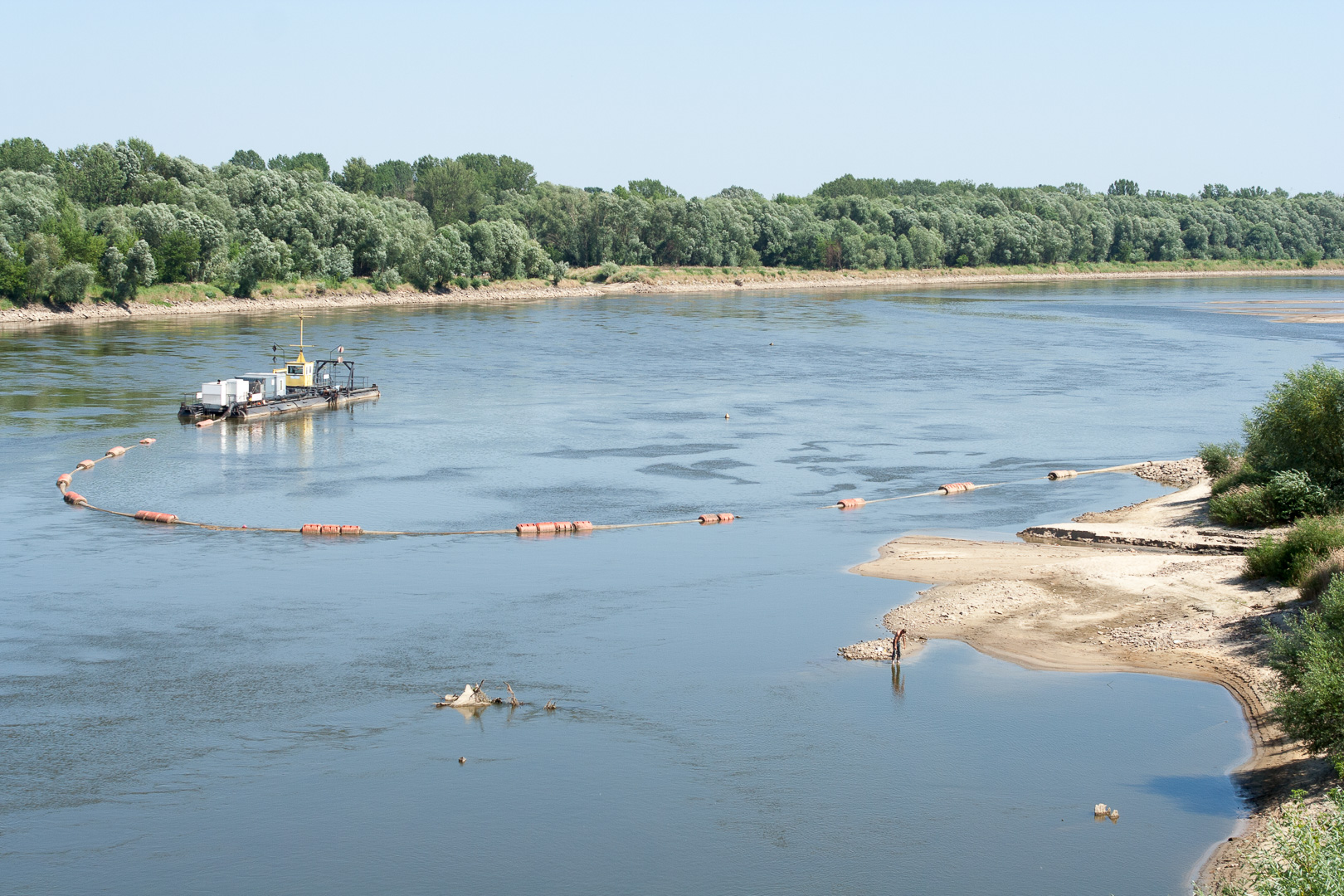 Pogłębiarka ssąco - refulacyjna (tzw. piaskarka) „Tryton” przy piaskarni Siekierki na Wiśle w Warszawie, widok z Mostu Siekierkowskiego. This is a photography of Natura 2000 protected area with ID PLB140004